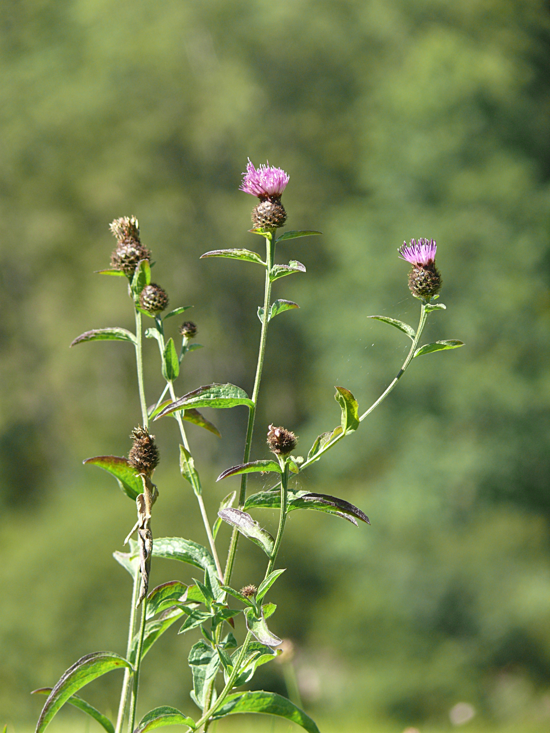 Centaurea nigra, Nordschwarzwald, Deutschland